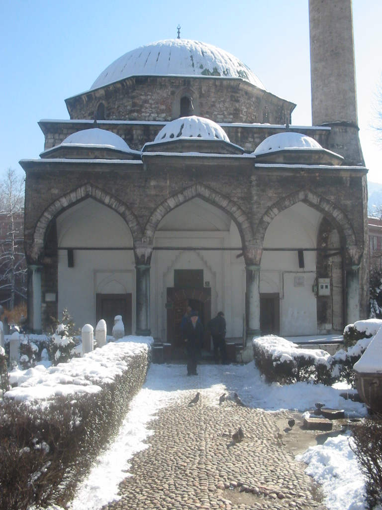 Ali-pašina džamija u Sarajevu (1561)